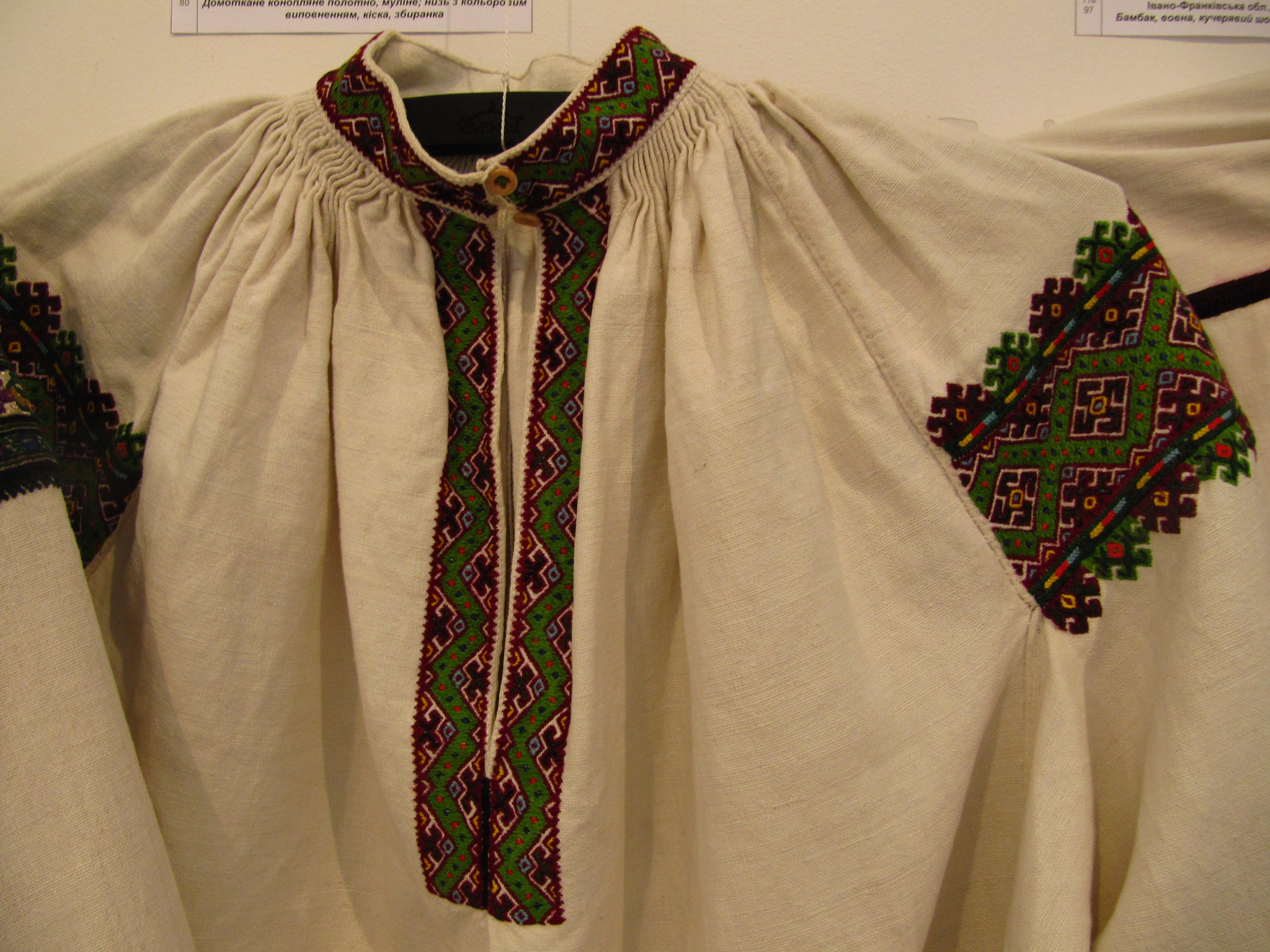 Жіноча сорочка. Початок 20 ст. Івано-Франківська обл. Косівський р. с. Соколівка. Виставка в музеї Івана Гончара (Київ).